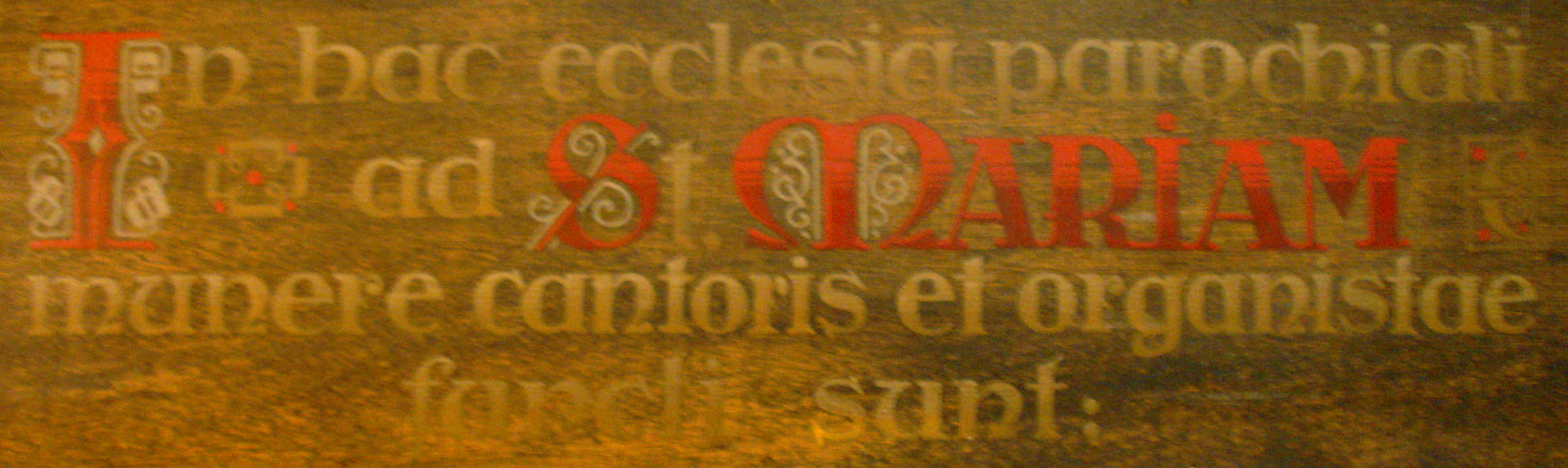 Gedenktafel der Kantoren und Organisten der Stadtpfarrkiche St. Marien in Hof an der Saale - auf der Orgelempore.